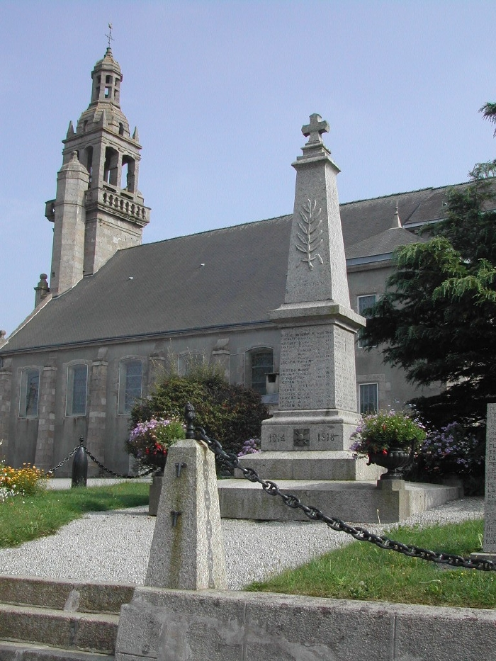 Monument aux Morts - St Renan-29